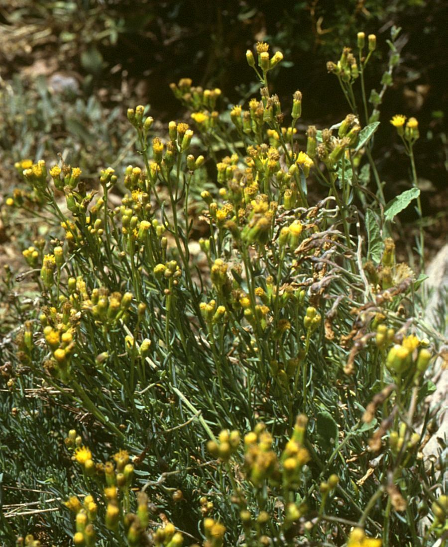 Senecio polygaloides, Korbblütler (Asteraceae) - Argentinien/Argentina, Paso de Uspallata, Puente del Inca, ca. 2700 m s.m. (Prov. Mendoza)